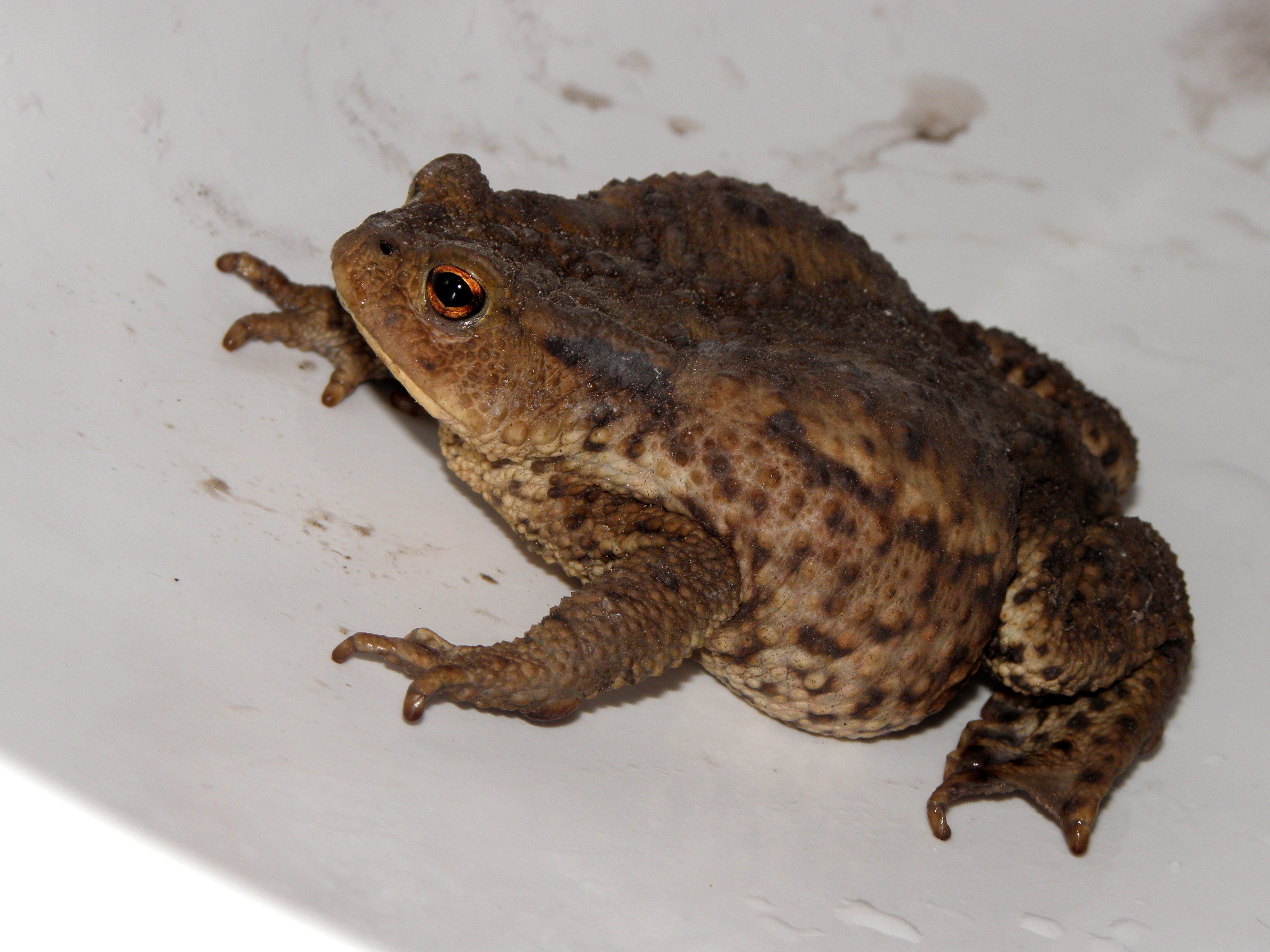 Crapaud